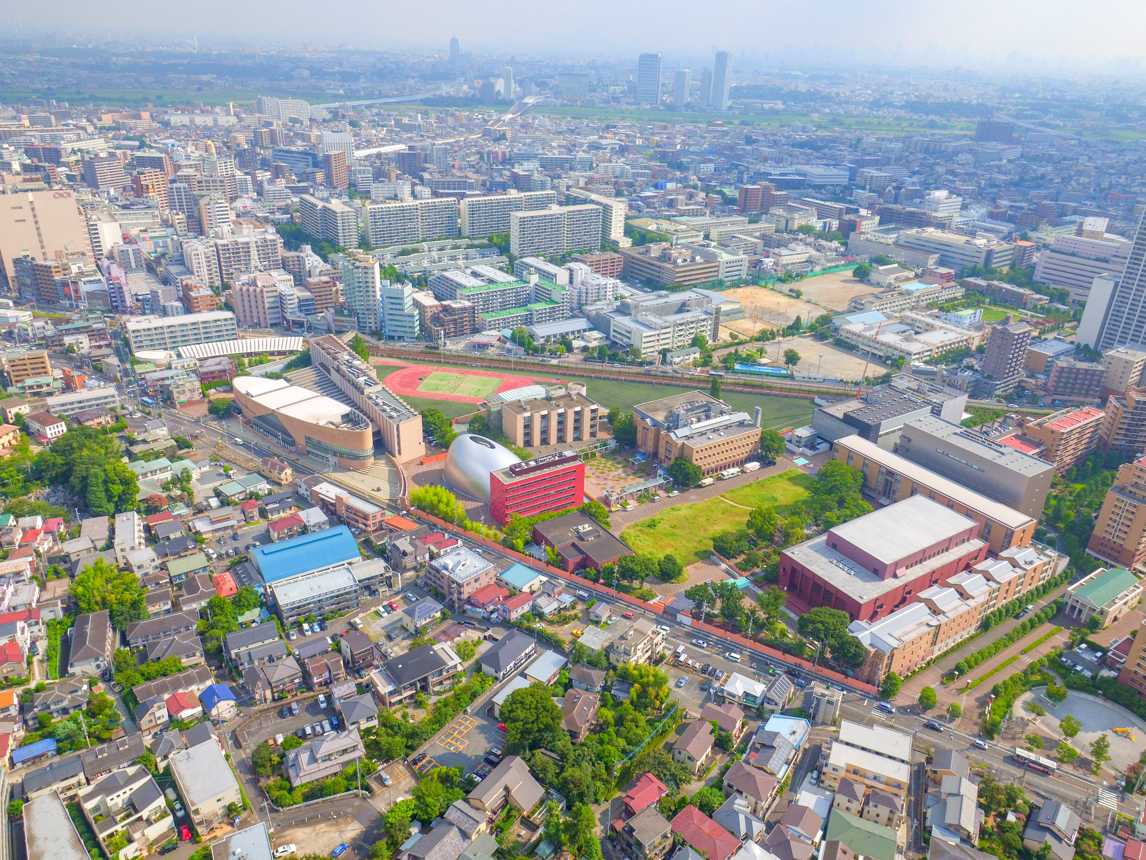 洗足学園上空より撮影